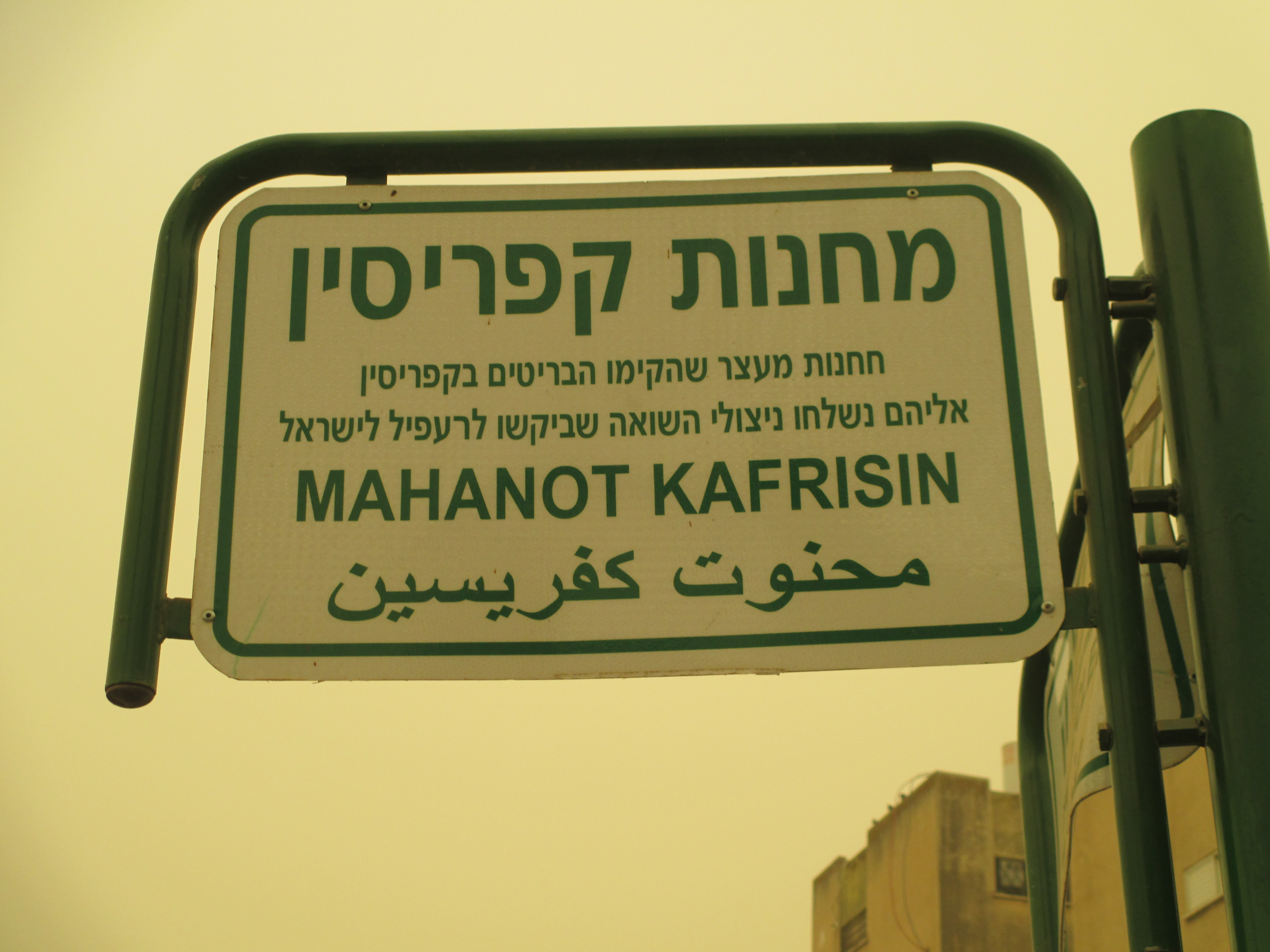 רחוב מחנות קפריסין בלוד